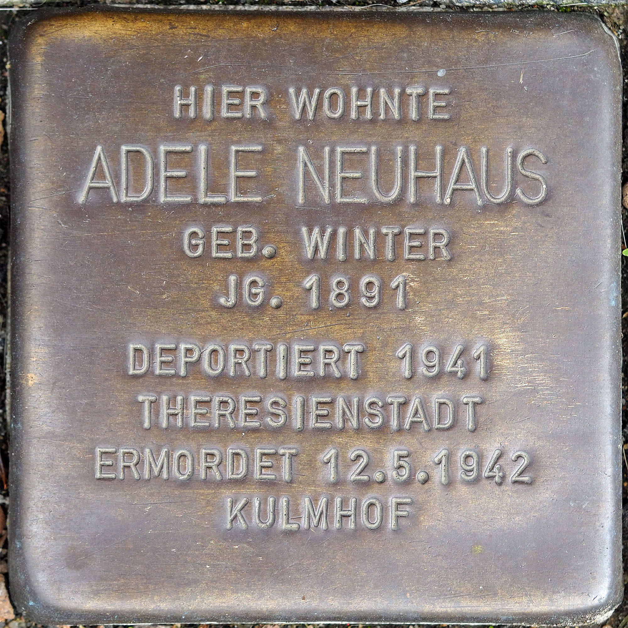 Stolpersteine Korschenbroich: Neuhaus, Adele